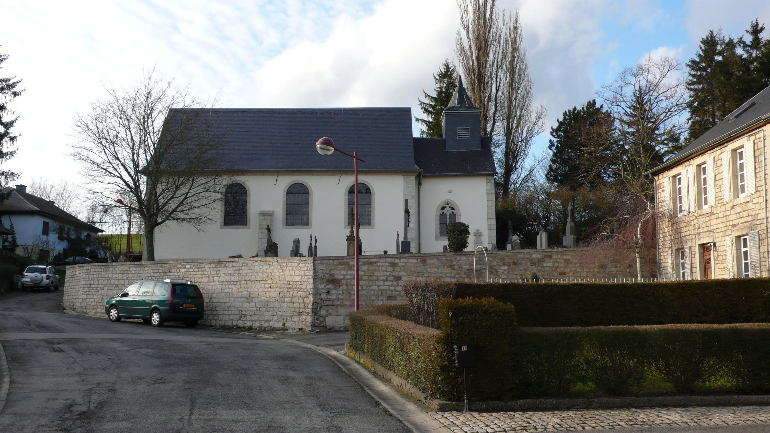 Kapell Näerzeng .